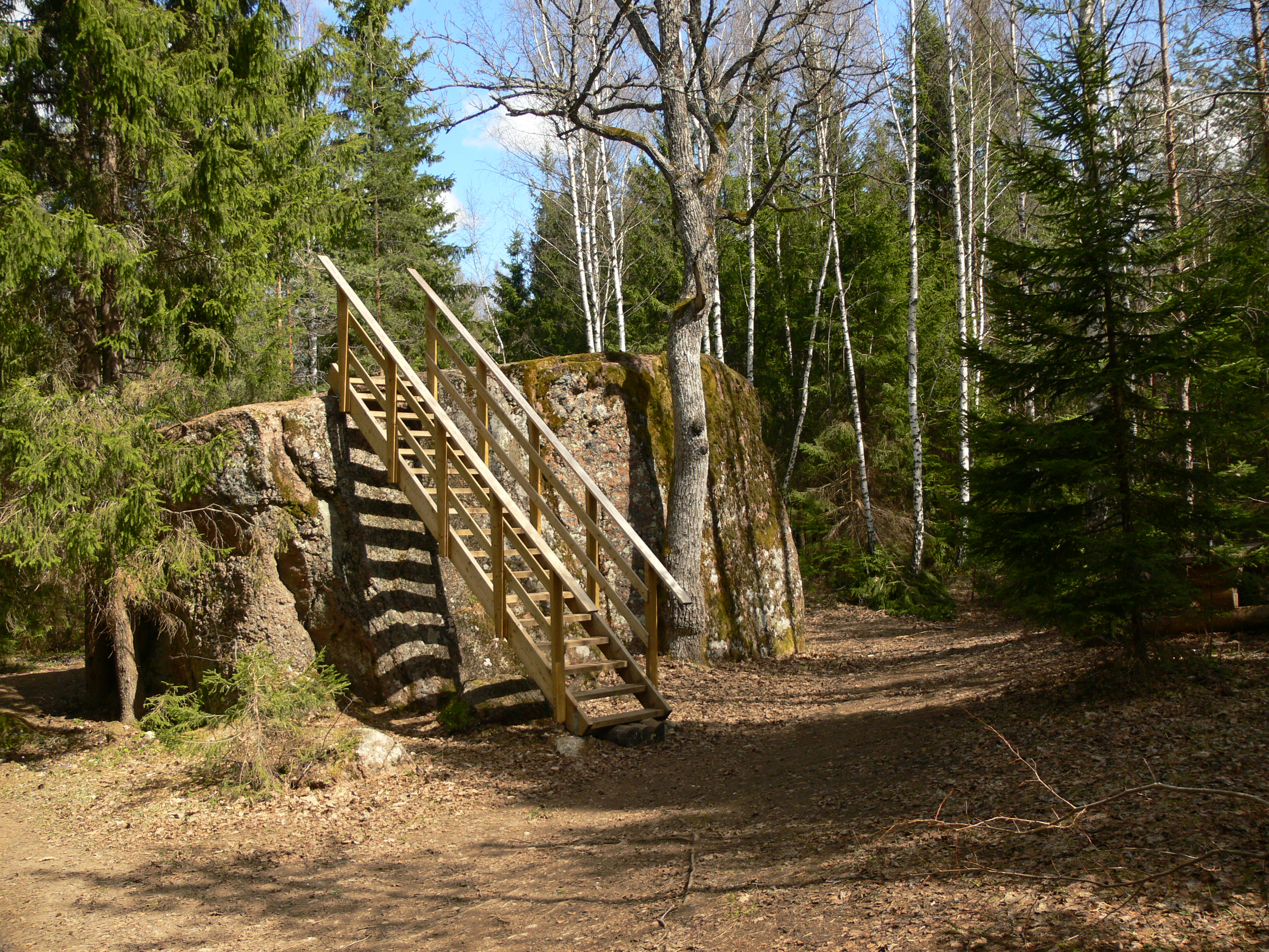 Pahkla, Raplamaa